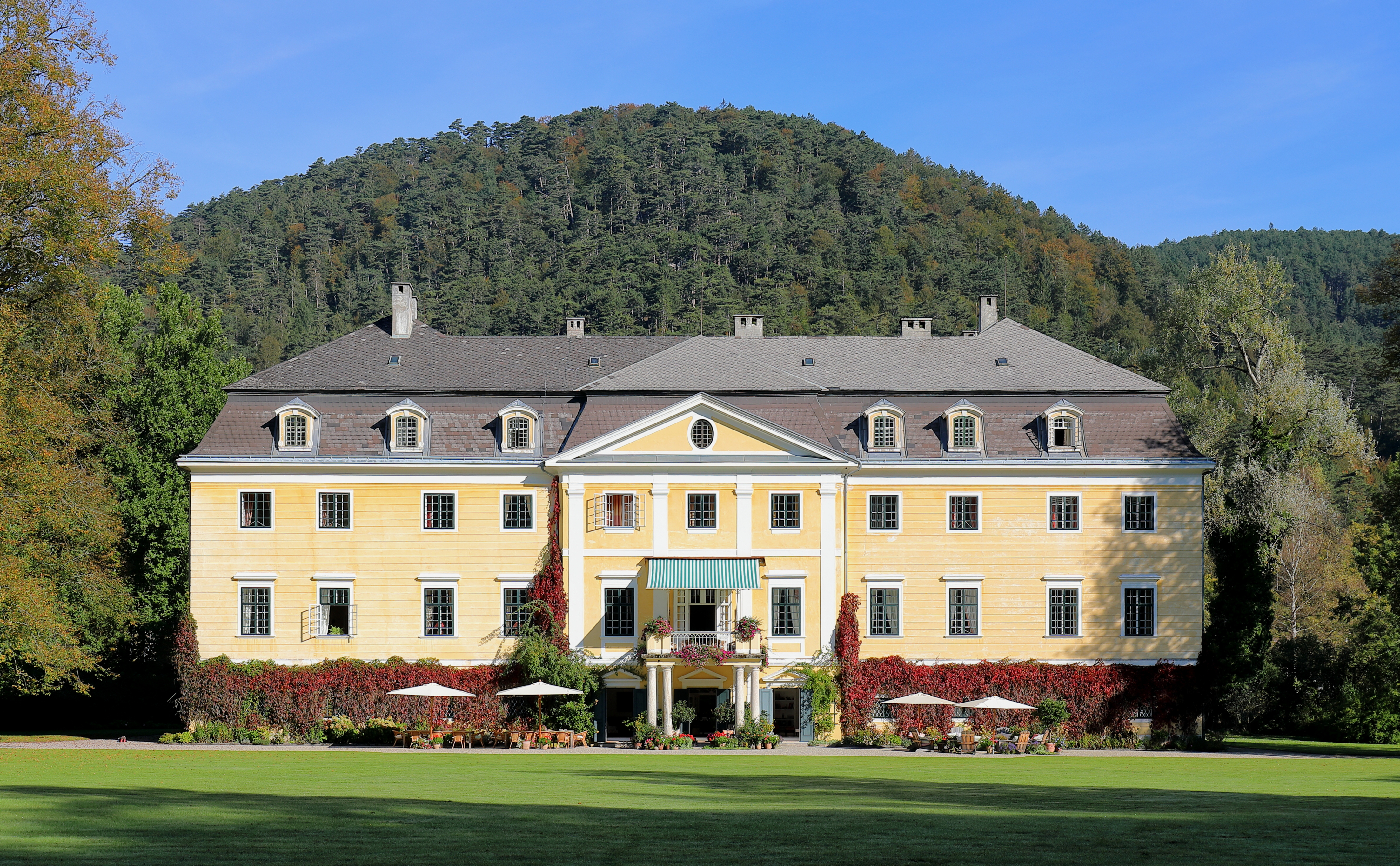 Südansicht des Schlosses Gutenstein bzw. Hoyos in der niederösterreichischen Marktgemeinde Gutenstein.Der repräsentative dreigeschossiger Vierflügelbau um einen Rechteckhof wurde ab 1670 in mehreren Bauphasen errichtet. Zuletzt wurde das Schloss 1909/1910 von dem Architekten Julius Deininger umgebaut. Unter anderem erhielt das Bauwerk dabei ein Mansardendach und die Risaliten Dreiecksgiebel.